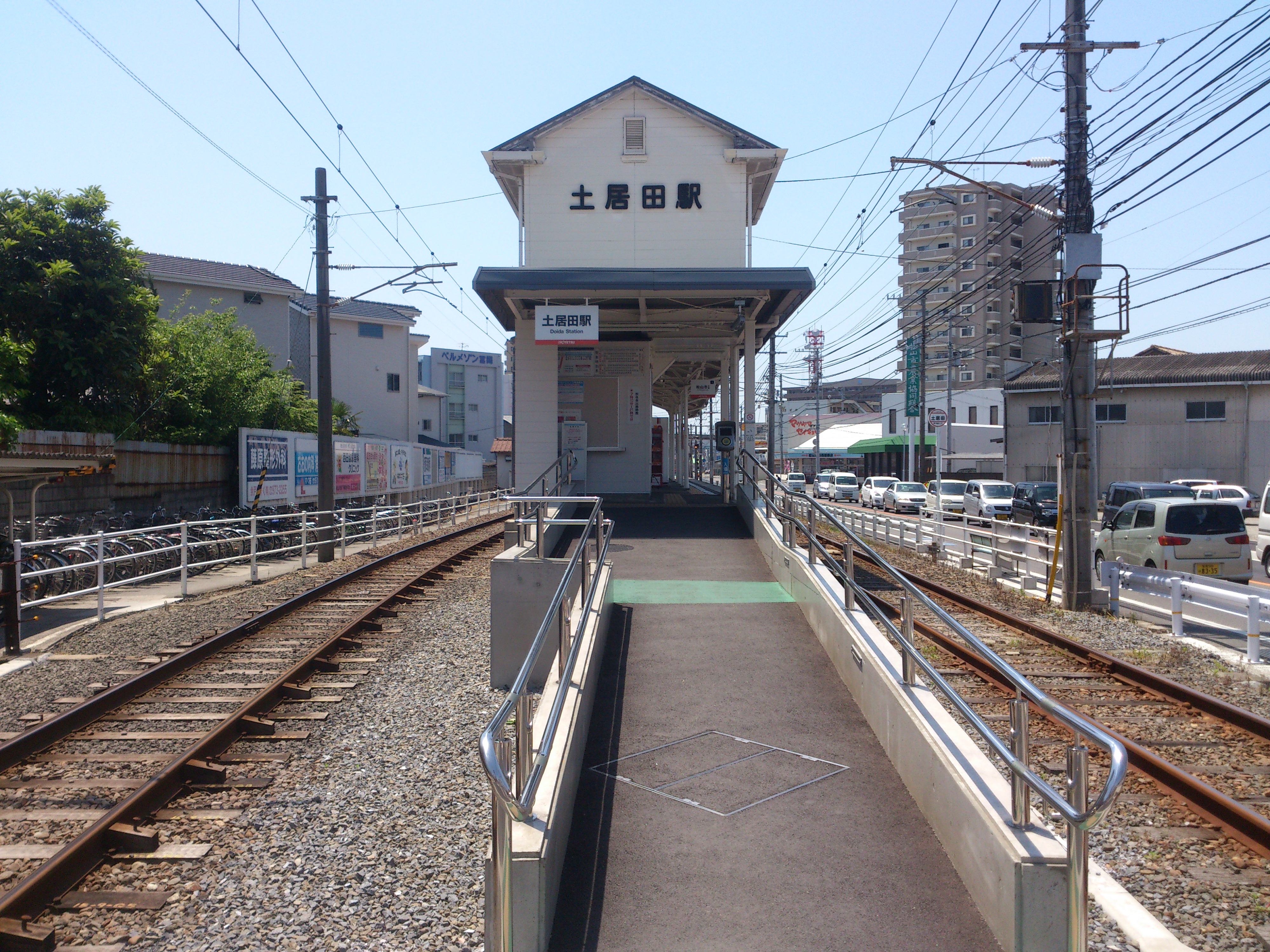 土居田駅の全景